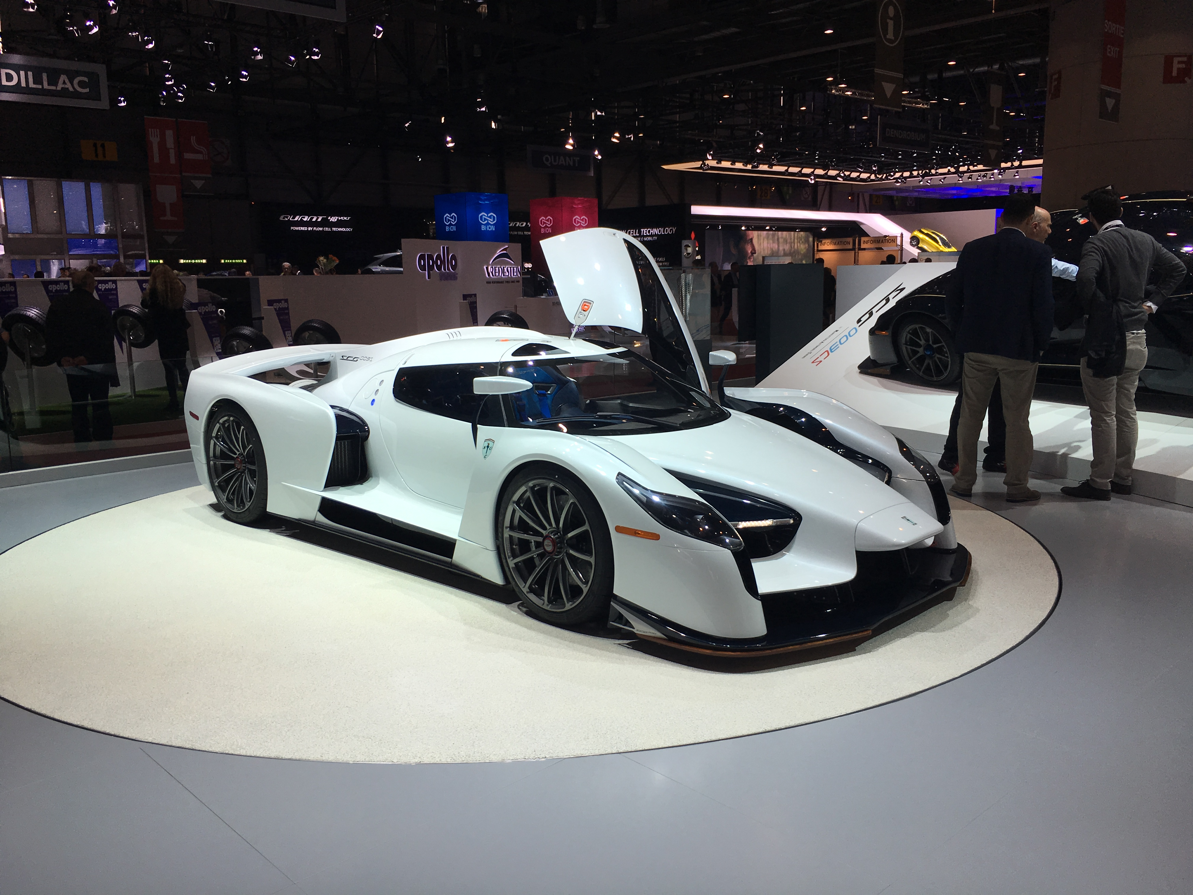 Geneva Auto Salon 2017